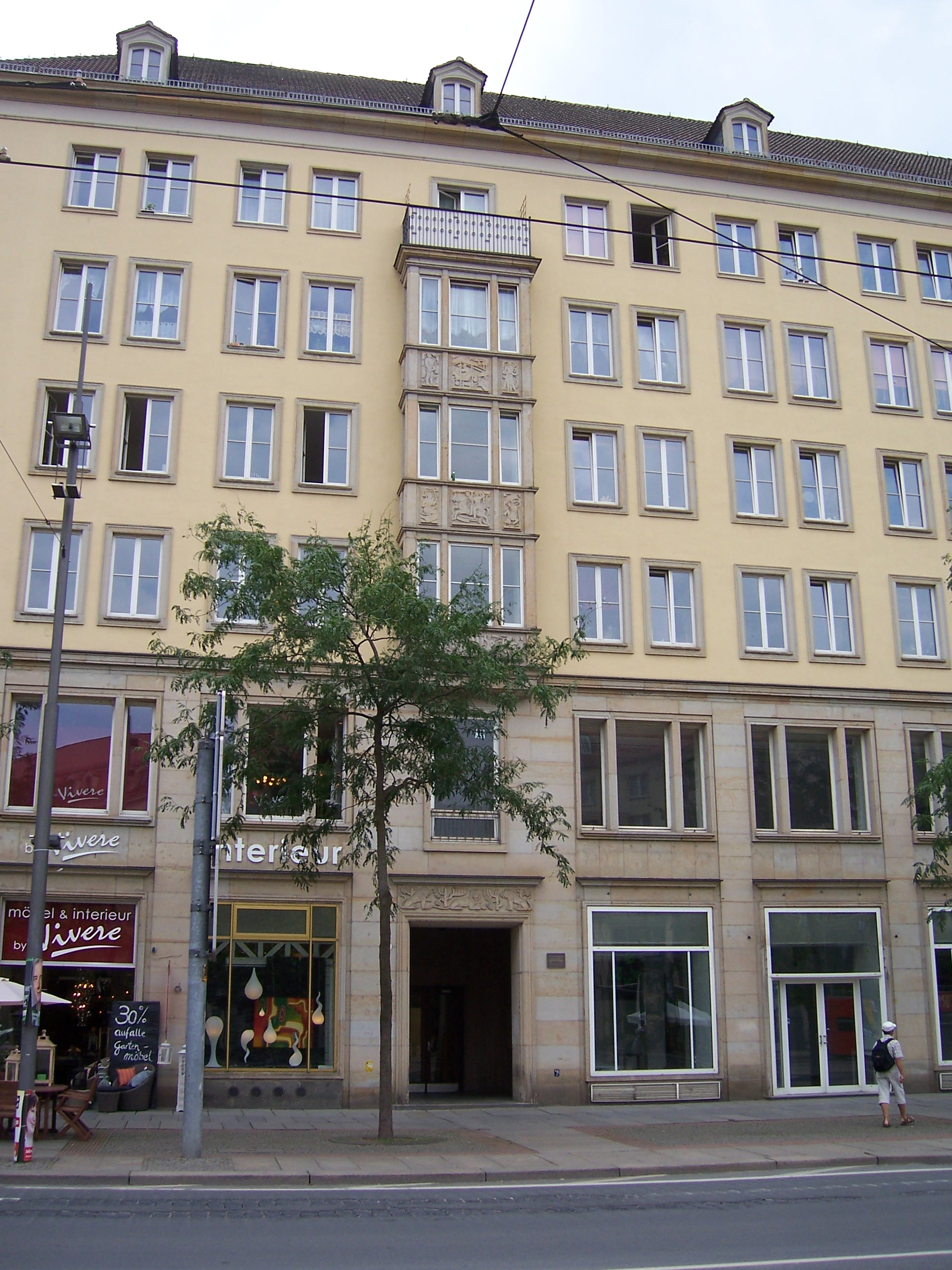 Wohnhaus des Informatikers N. J. Lehmann auf der Wilsdruffer Straße in Dresden